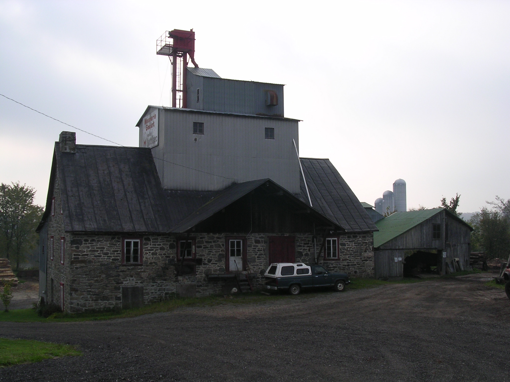 Moulin Goulet, situé sur la rivière des Envies à Saint-Stanislas (Mauricie, Québec). Moulin à eau; moulin à farine; meunerie; moulin à scie.